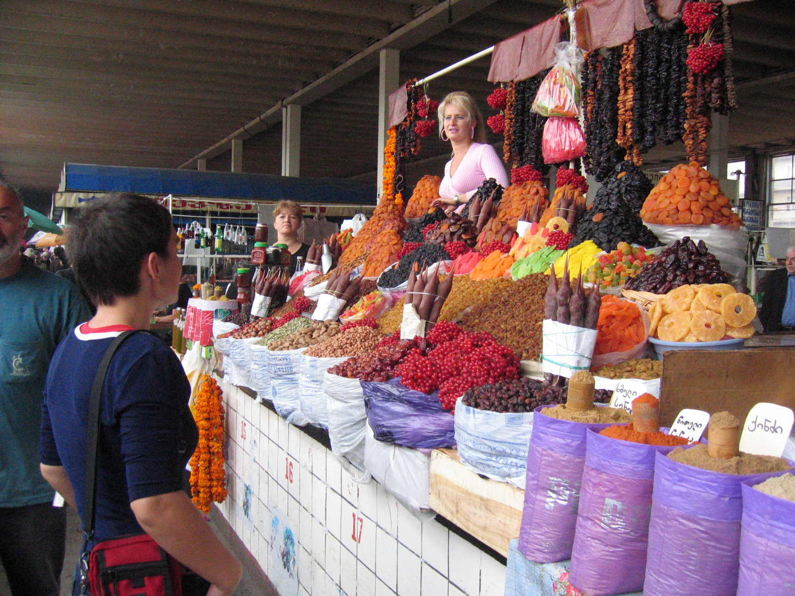 Markthalle, Stand mit kandierten Früchten, Tiflis, Georgien